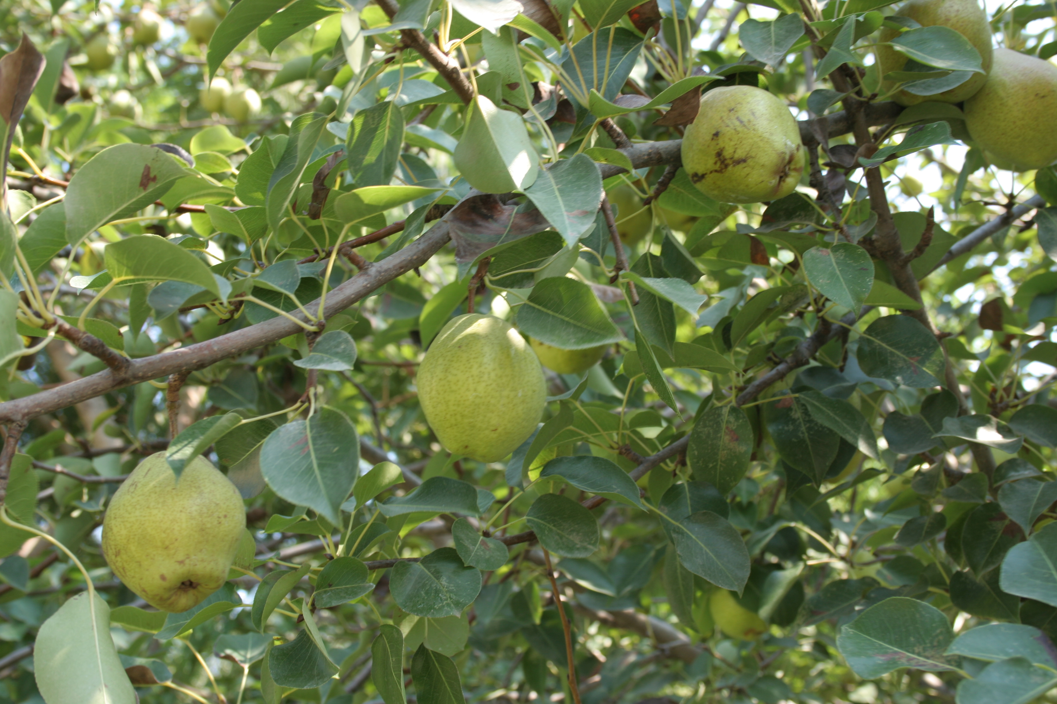 Armut ağacı